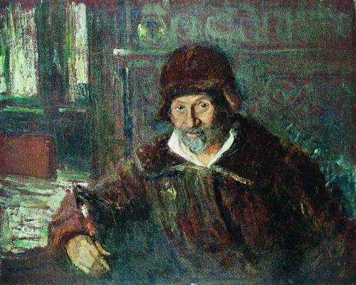 Зимой 1920 года Репин написал автопортрет – последнее большое изображение художником самого себя, подлинно трагический документ, который смог бы заменить всякое другое свидетельство о жизни Репина в Куоккале в послереволюционные годы. Этот портрет – диалог Репина с самим собой: в полутёмной комнате старик, одетый в зимнее пальто и шапку, напряжённо вглядывается в себя, будто пытаясь понять, кто он и почему оказался в таком странном положении – в одиночестве, холоде. И как сузился вокруг него мир, как ограничен. Куоккала стала маленьким заброшенным посёлком с заколоченными или разобранными домами в пограничной полосе. «Теперь это пустыня», - писал Репин. (Кириллина Е. Репин в "Пенатах". Л., 1977, с. 182)